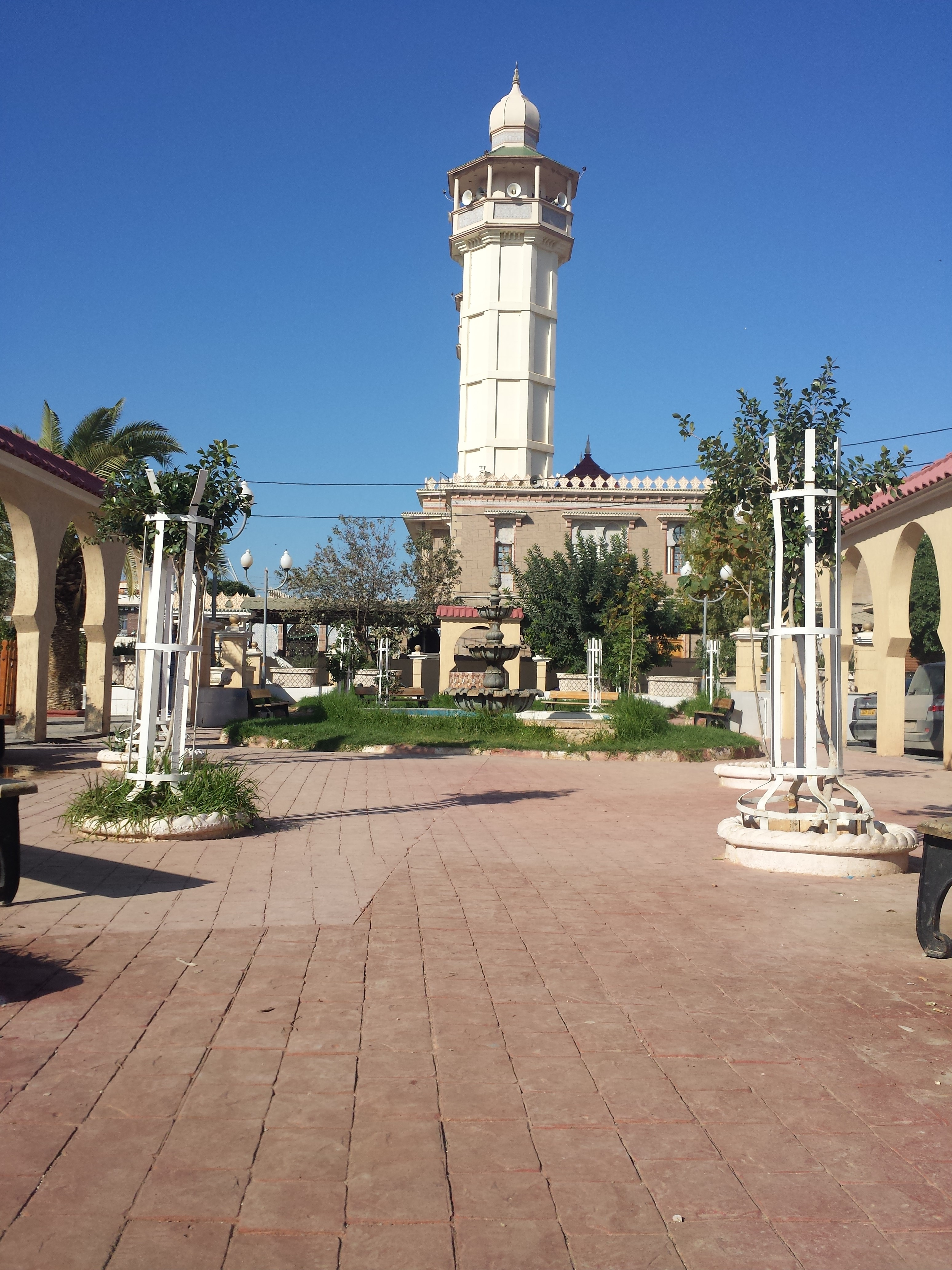 un mosqué à BOuKADir